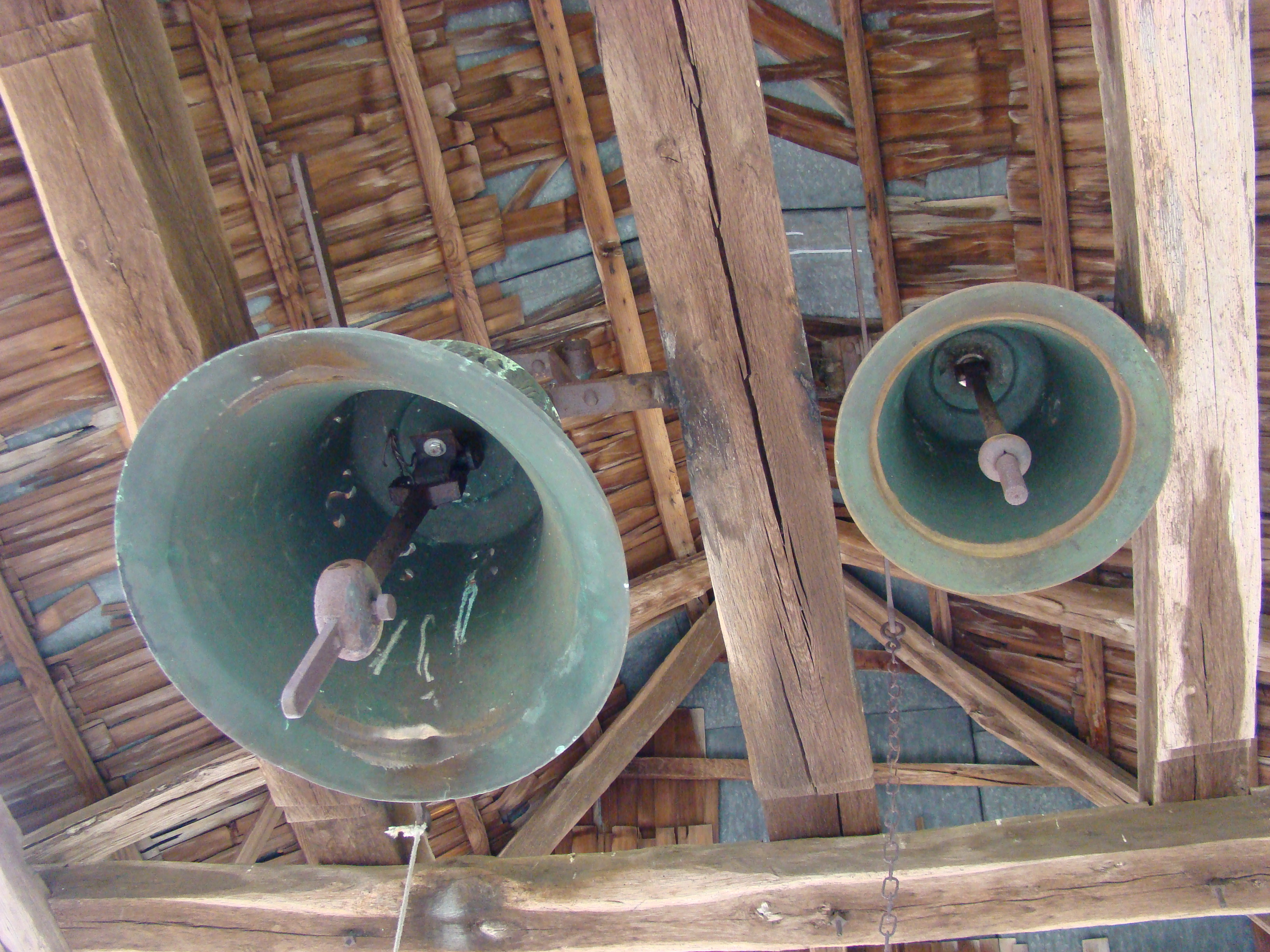 Biserica de lemn "Sfântul Dumitru" , sat DUBEŞTI; comuna OHABA LUNGĂ